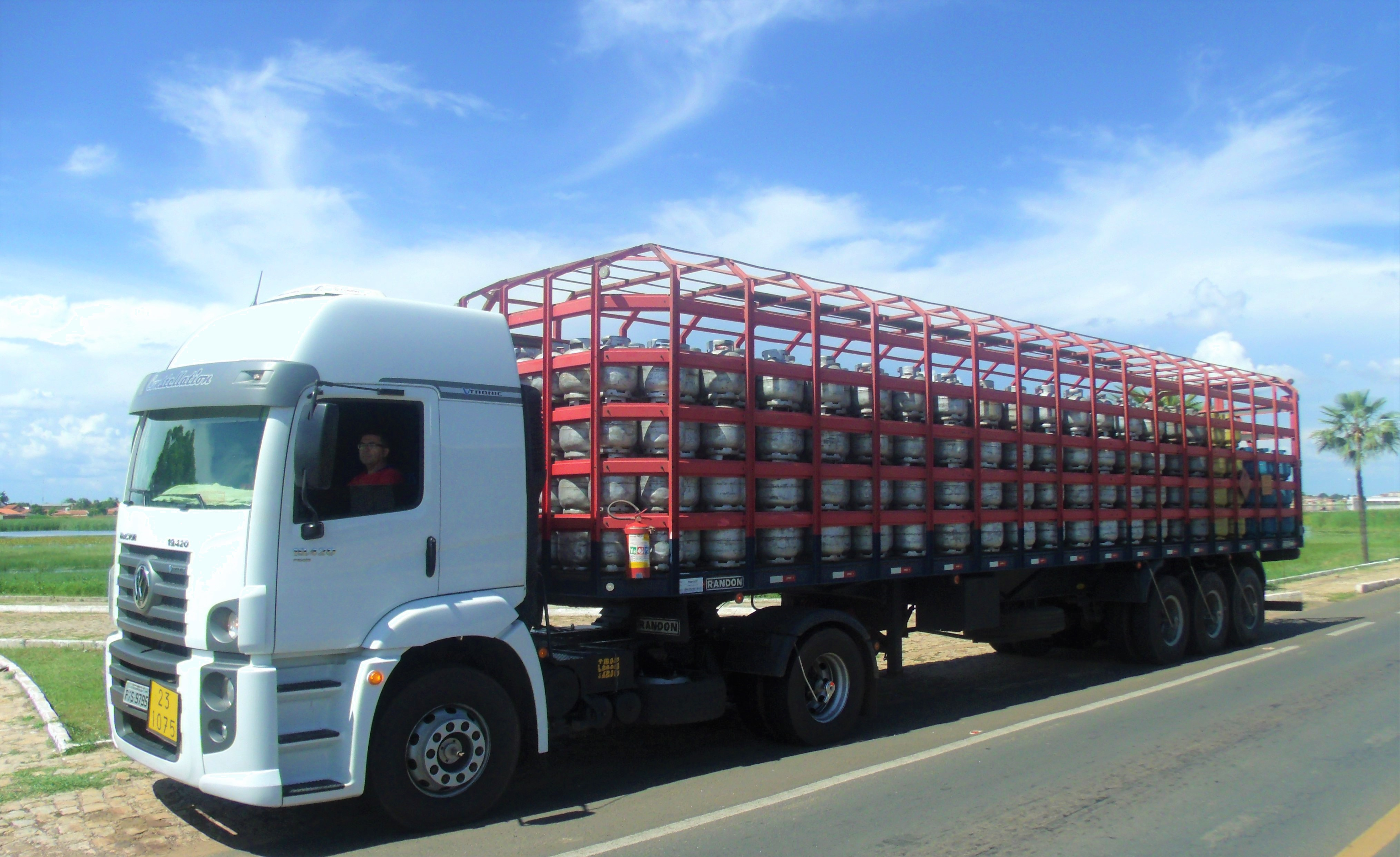 Carreta com carga de botijões de gás de cozinha do Grupo Edson Queiroz na rodovia federal BR-343.